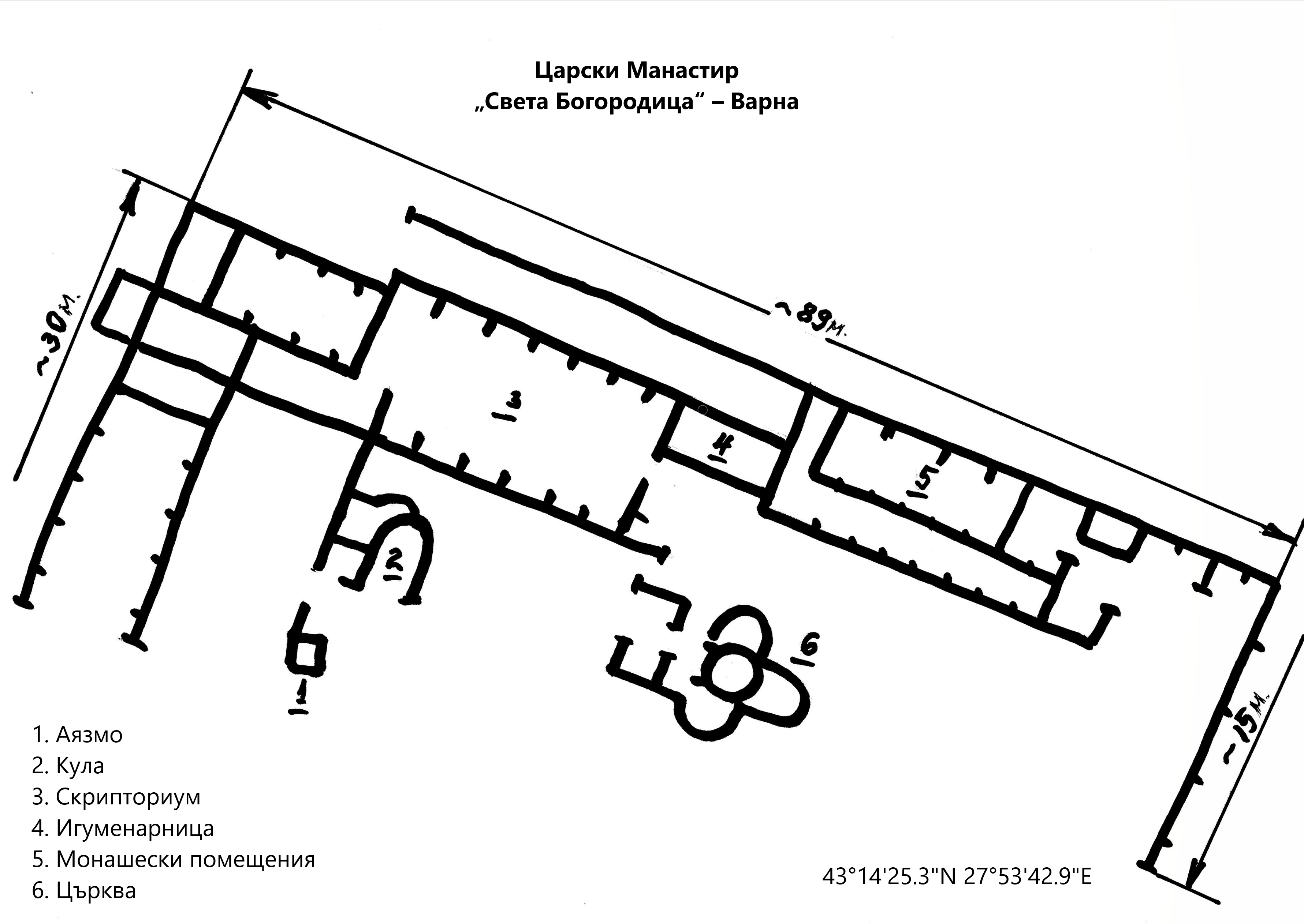 Царски манастир „Света Богородица“ – Варна